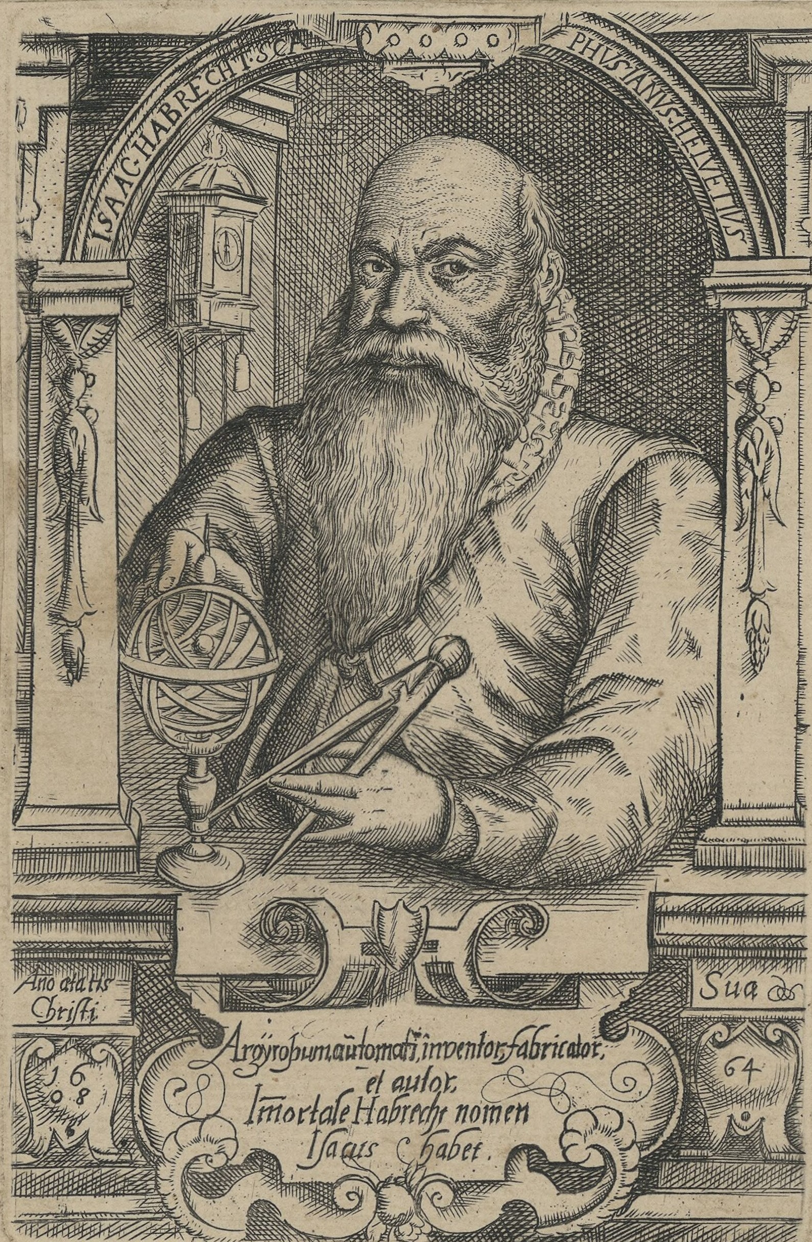 Isaak Habrecht. Zeitgenössischer Stich von 1608